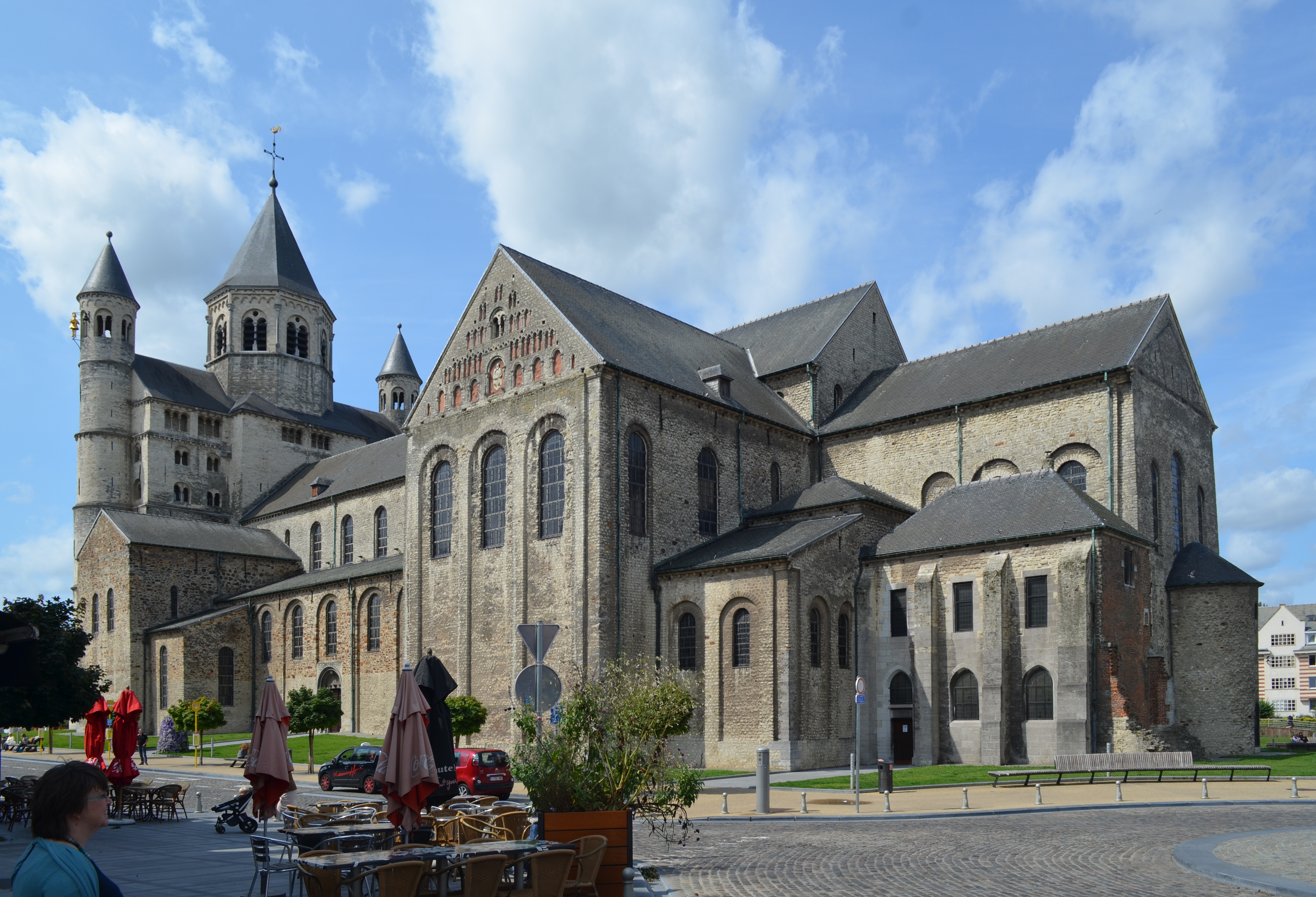 Nivelles (Belgique) - Collégiale Sainte-Gertrude de Nivelles - août 2015